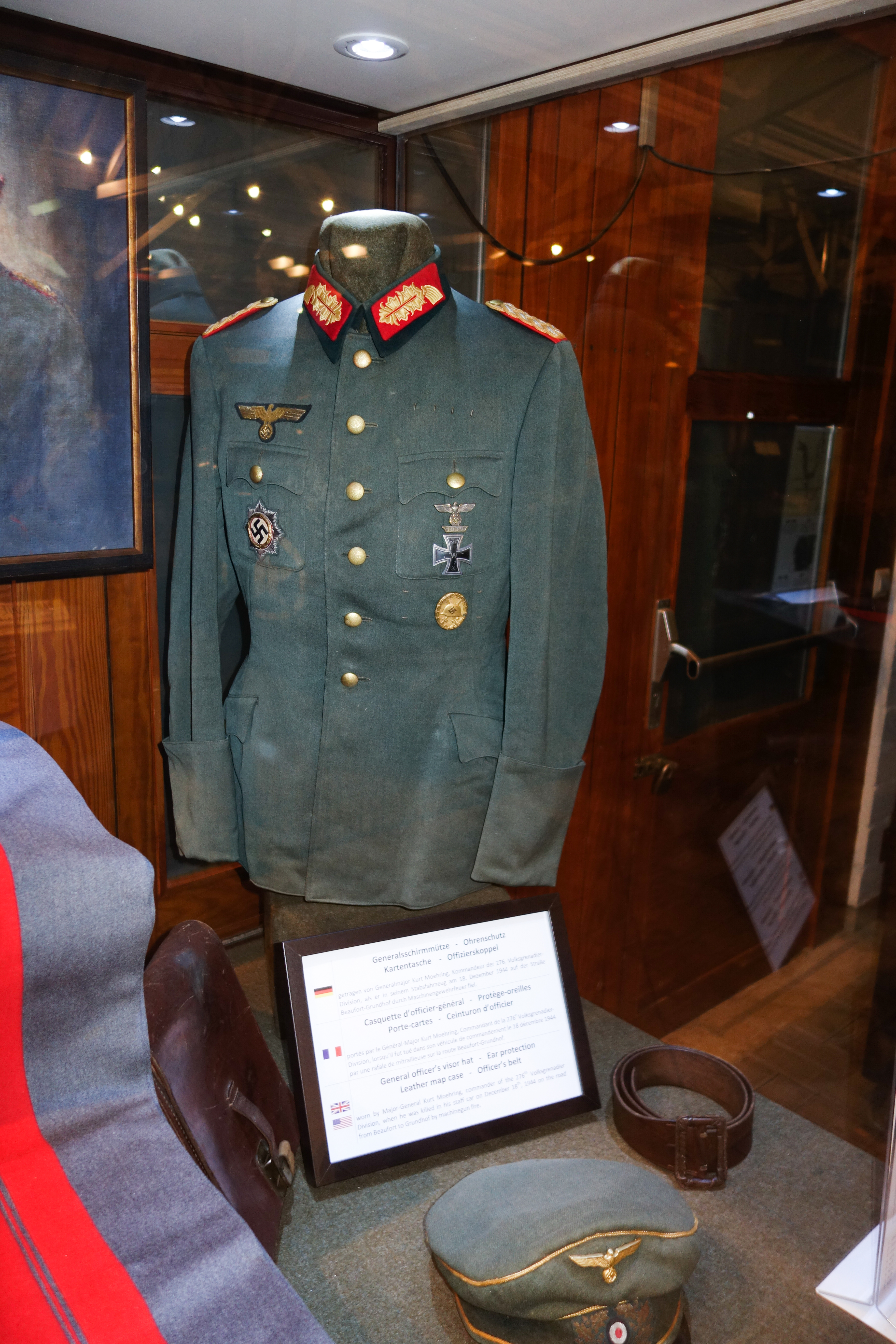 Luxembourg 2015